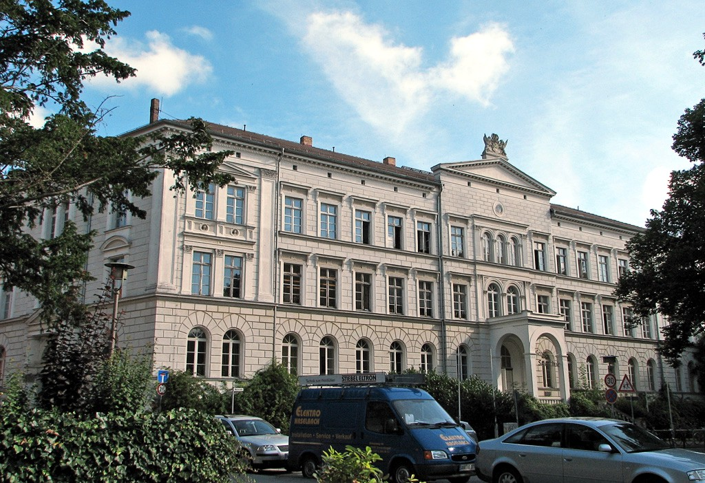 Beschreibung: Gebäude des Innerstädtisches Gymnasium in der Wallstraße in Rostock / Germany Fotograf: Darkone, 17. August 2005